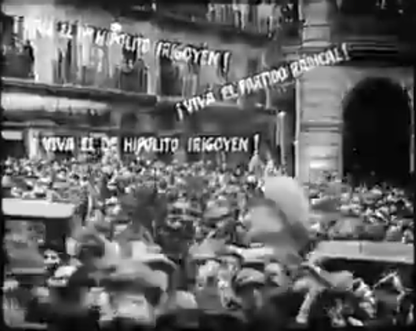 "La obra de gobierno radical, 1916-1922", película muda encargada por la Unión Cívica Radical para la campaña electoral de las elecciones presidenciales de 1928.